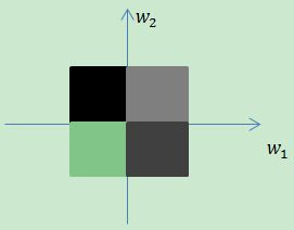 2D Filter Bank